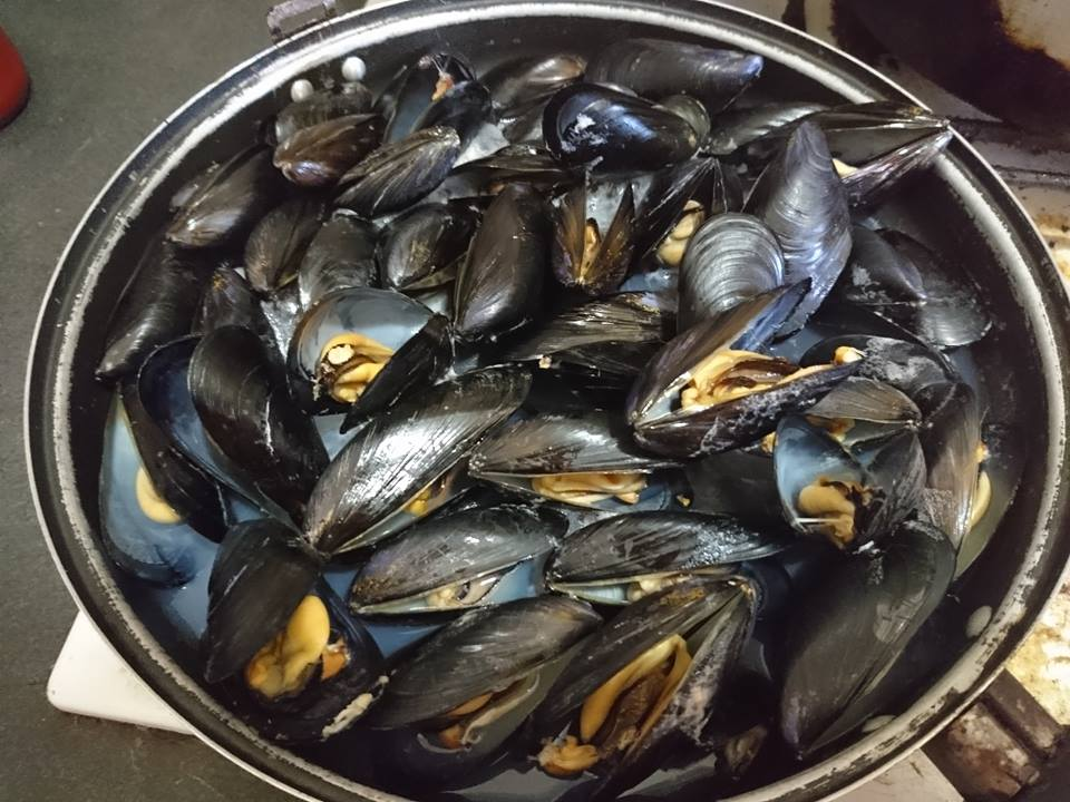 Cozza tarantina aperta sul fuoco.